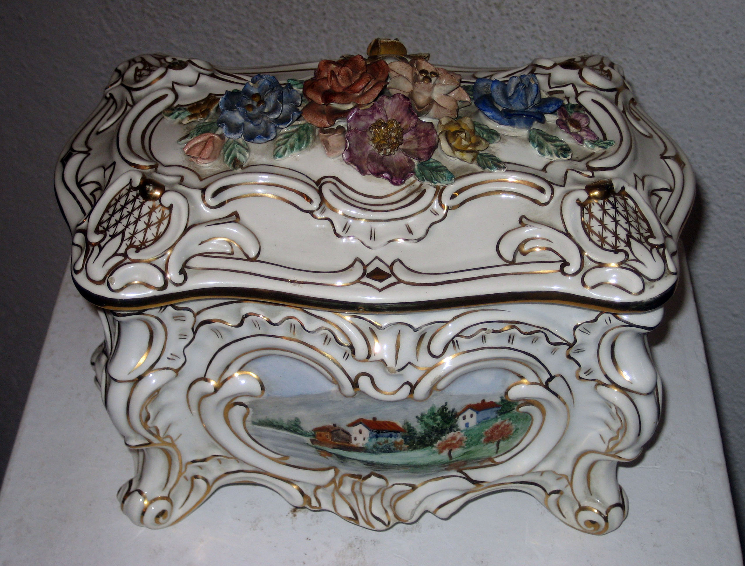 Caja de 20 cm con la tapadera de floresde cerámica y el resto pintado y dorado. Alcora Finales siglo XIX